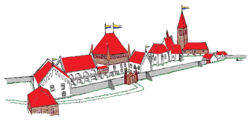 Rekonstrukční kresba Fryštátského hradu v Karviné na základě historického popisu a dochovaných staveb